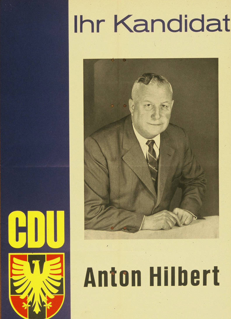 Ihr Kandidat Abbildung: Porträtfoto Plakatart: Kandidaten-/Personenplakat mit Porträt Auftraggeber: Verantw.: CDU-Bundesgeschäftsstelle Bonn Drucker_Druckart_Druckort: Repro-Druck, Schmiden bei Stuttgart Objekt-Signatur: 10-001: 1040 Bestand: Plakate zu Bundestagswahlen (10-001) GliederungBestand10-18: Plakate zu Bundestagswahlen (10-001) » Die 4. Bundestagswahl am 17. September 1961 » CDU » Mit Porträtfoto Lizenz: KAS/ACDP 10-001: 1040 CC-BY-SA 3.0 DE